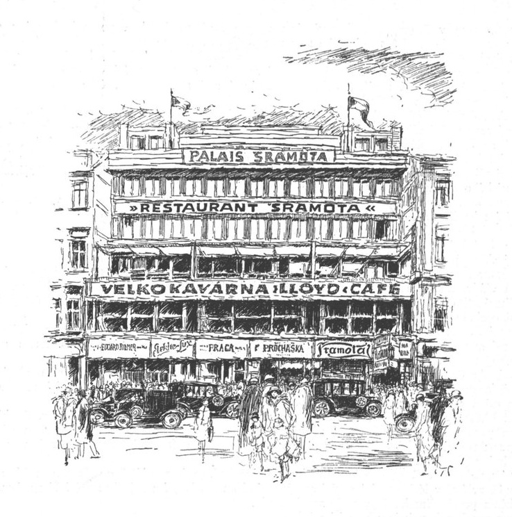 Palais Šramota, Restaurant Šramota, Café Lloyd, Praha 1 - Staré Město, čp. 584, Na Příkopě 29. Kresba z dobového propagačního tisku.